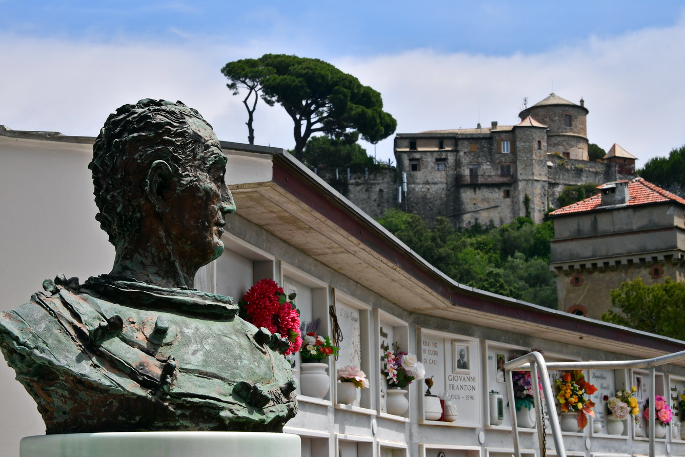 Portofino Friedhof (Cimitero)